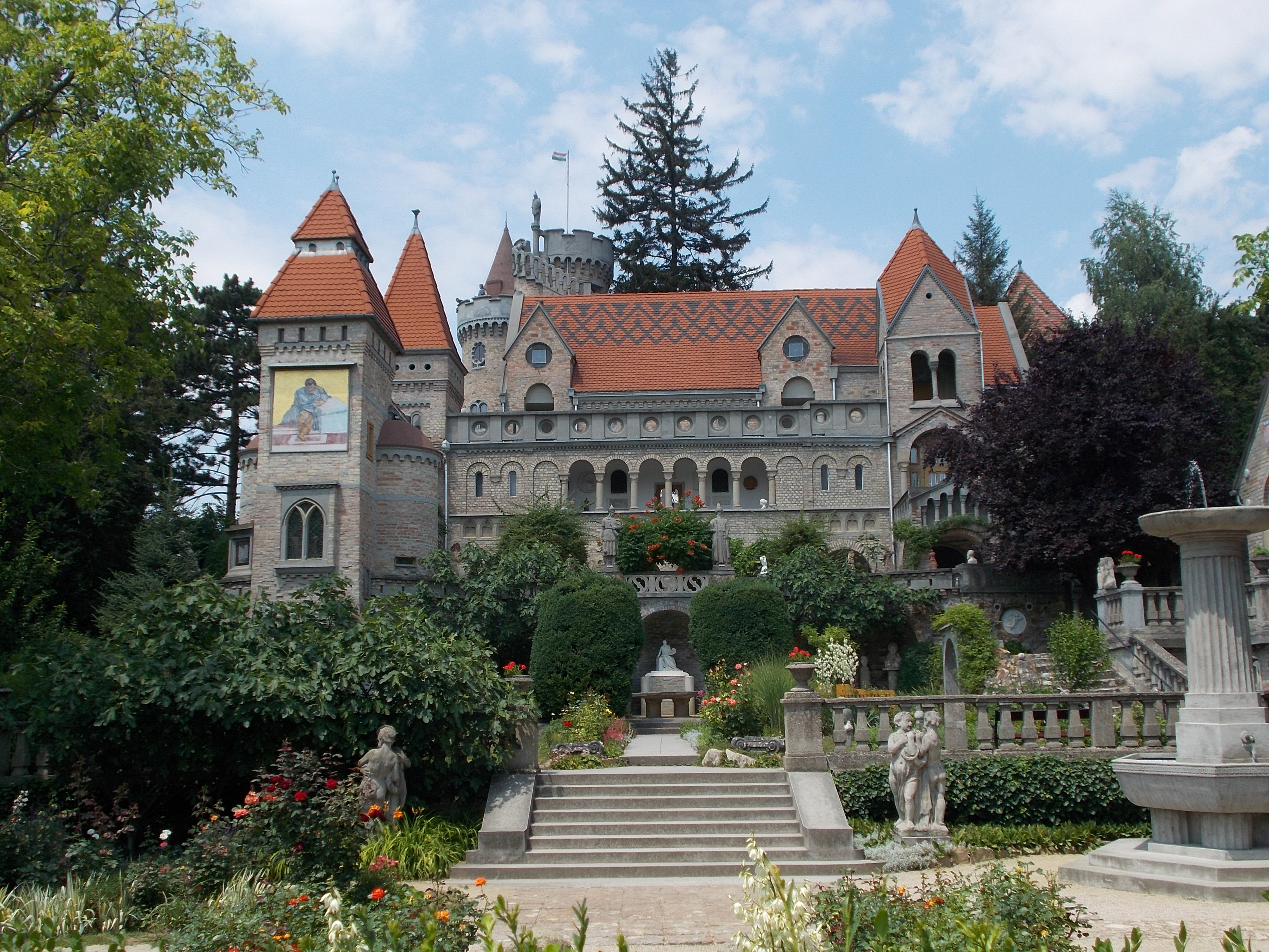 Bory vár. Látkép az utcáról. - Magyarország, Fejér megye, Székesfehérvár, Öreghegy, Máriavölgy út 54